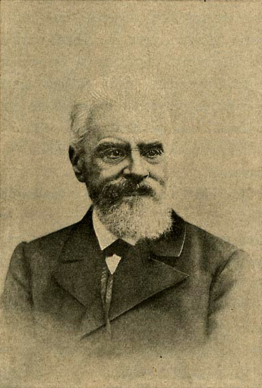 V. N. Hitrovo, IPPO, Photo 1903.